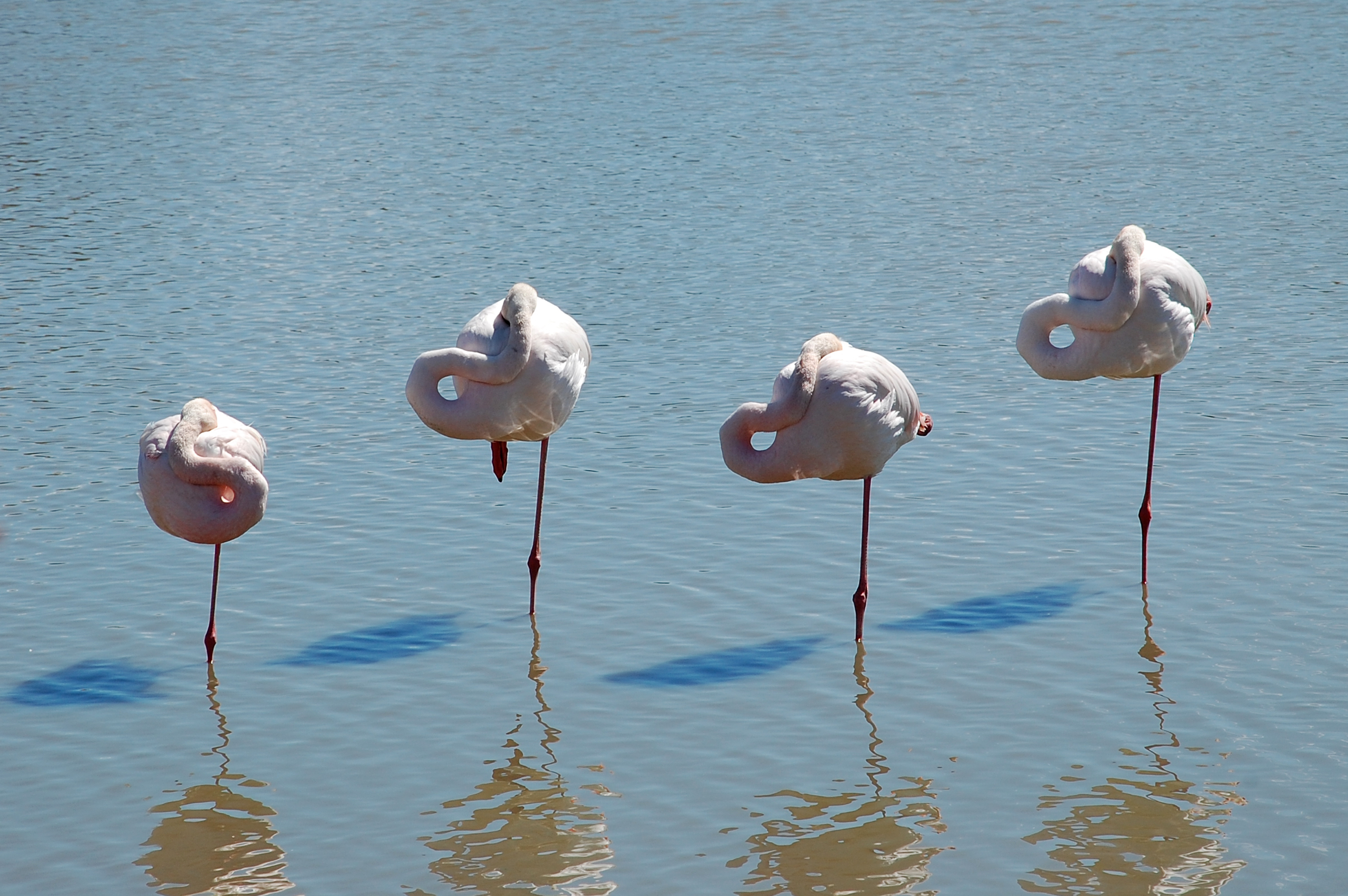 Flamants dans le parc régional de Camargue